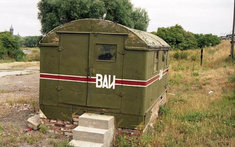 11.-18.8.1991 Bundesland Sachsen-Anhalt, Wittenberg Sowjetisches Wächterhäuschen an der Elbe Information added by Wikimedia users.